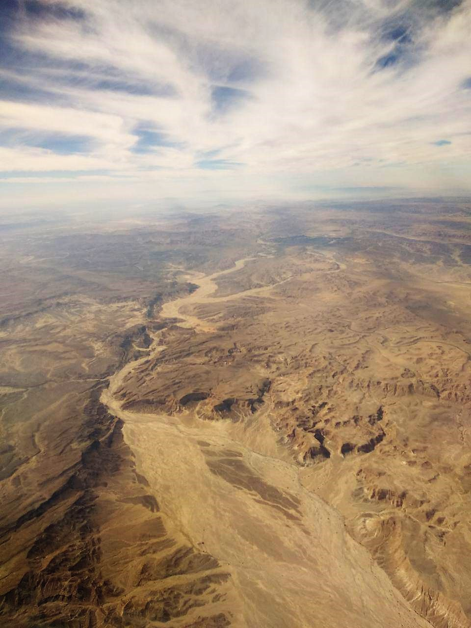 שפך נחל פארן בצילום ממטוס לאילת